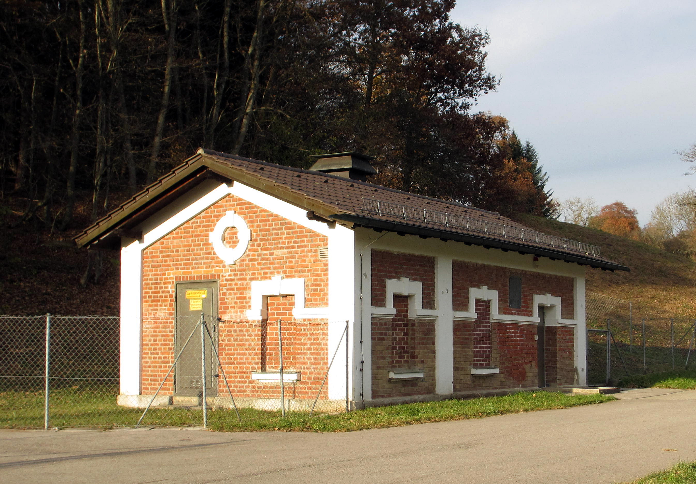 Starnberg, OT Söcking, Bismarckstraße. Am Fuße der Maisinger Schlucht liegen die Brunnen für die Trinkwasserversorgung der Stadt Starnberg. In ihrer Nähe steht dieses kleine Wasserwerk, ein Satteldachbau mit gegliederten Blankziegelfassaden. Eine Tafel bezeugt, dass es 1896 in Betrieb genommen wurde. This is a photograph of an architectural monument.